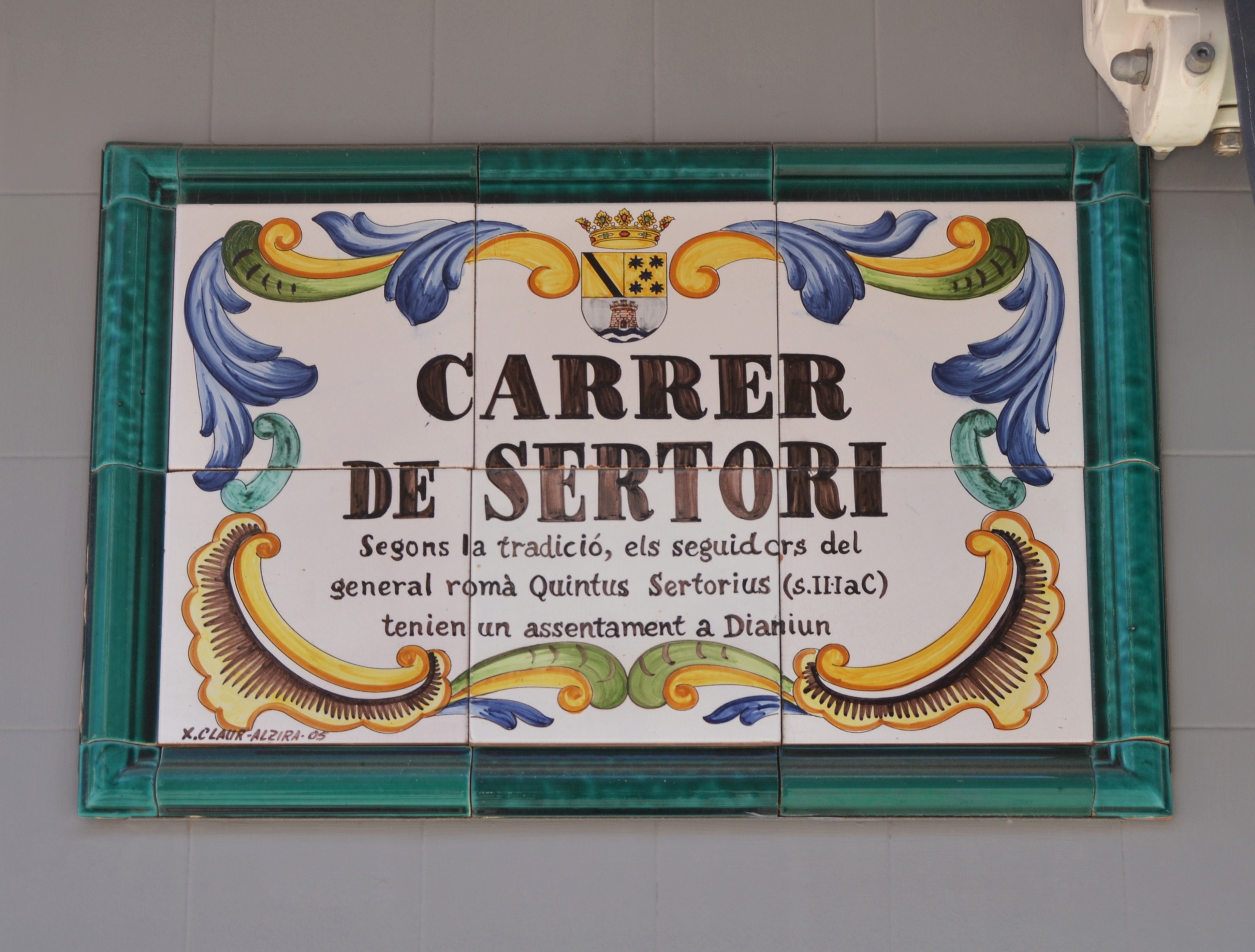 Placa del carrer de Sertori de Dénia.